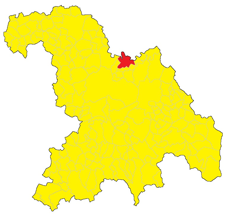 Mappa del comune di Bassignana (AL).